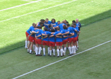 Stade Français Rugby team at Parc des Princes